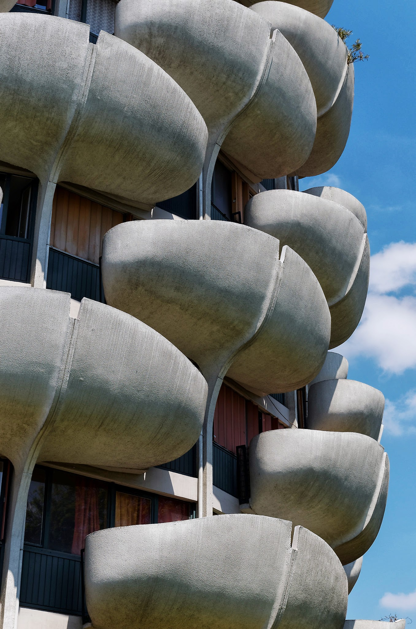 Les Choux de Créteil